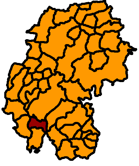 Stützerbach hervorgehoben, Ilm-Kreis